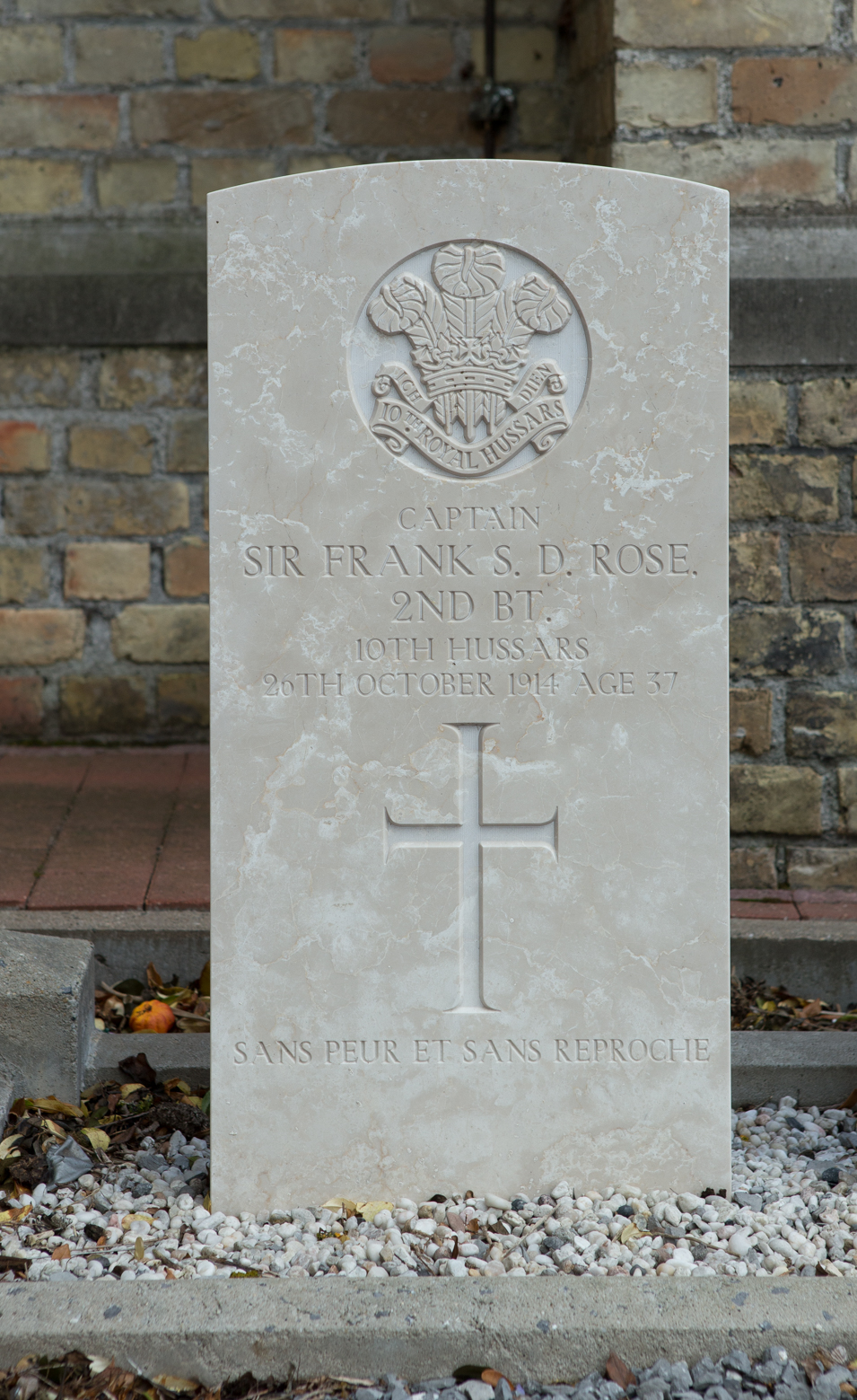 Zandvoorde Churchyard. Sir Frank S. D. Rose. Frank Stanley Rose, 2nd Baronet of Hardwick House.